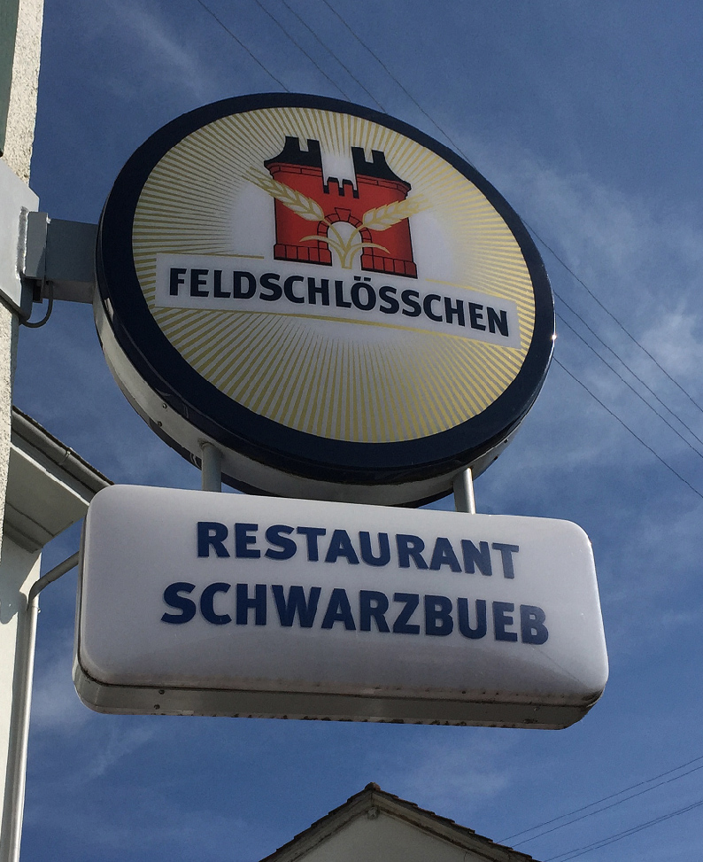 Wirtshausschild Feldschlösschen in Nuglar-St. Pantaleon